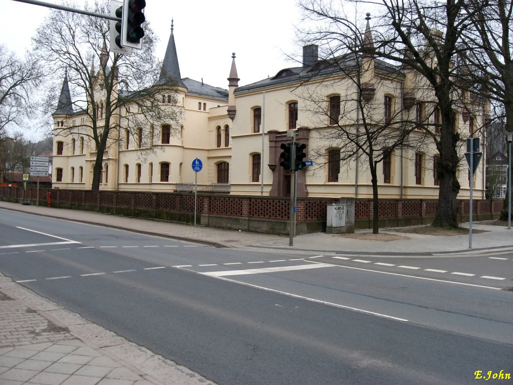 Nordhausen am Harz, altes Landratsamt in der Grimmelallee, 2011